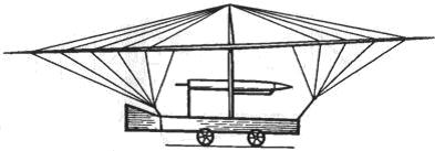 Проект реактивного самолёта Ш. де Луврье Рисунок из патента.